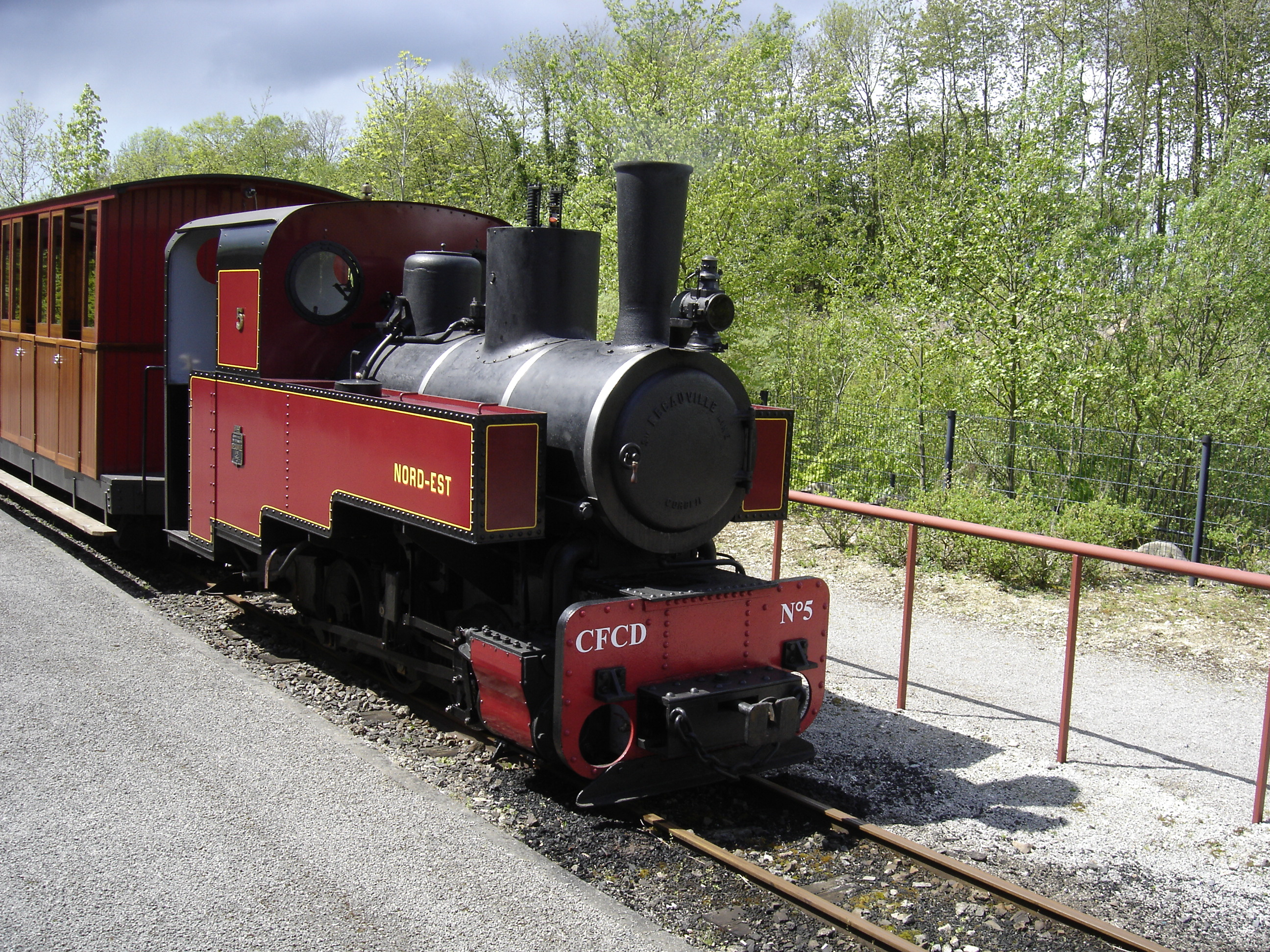 Locomotive construite par "Decauville" type 030 T (N°1652 de 1916) de l'APPEVA (Chemin de fer Froissy-Dompierre).